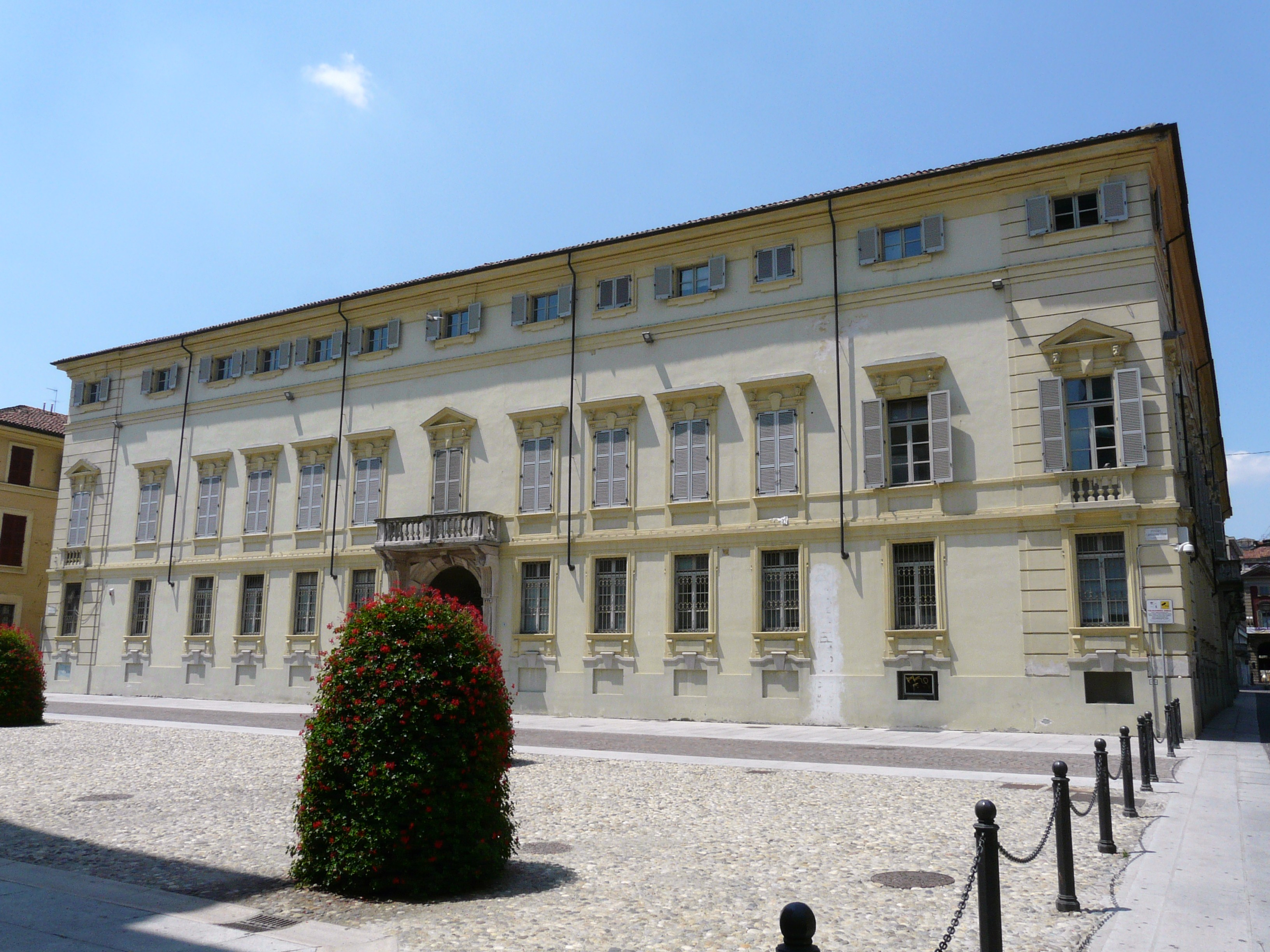 Palazzo Cuttica di Cassine, Alessandria, Piemonte, Italia